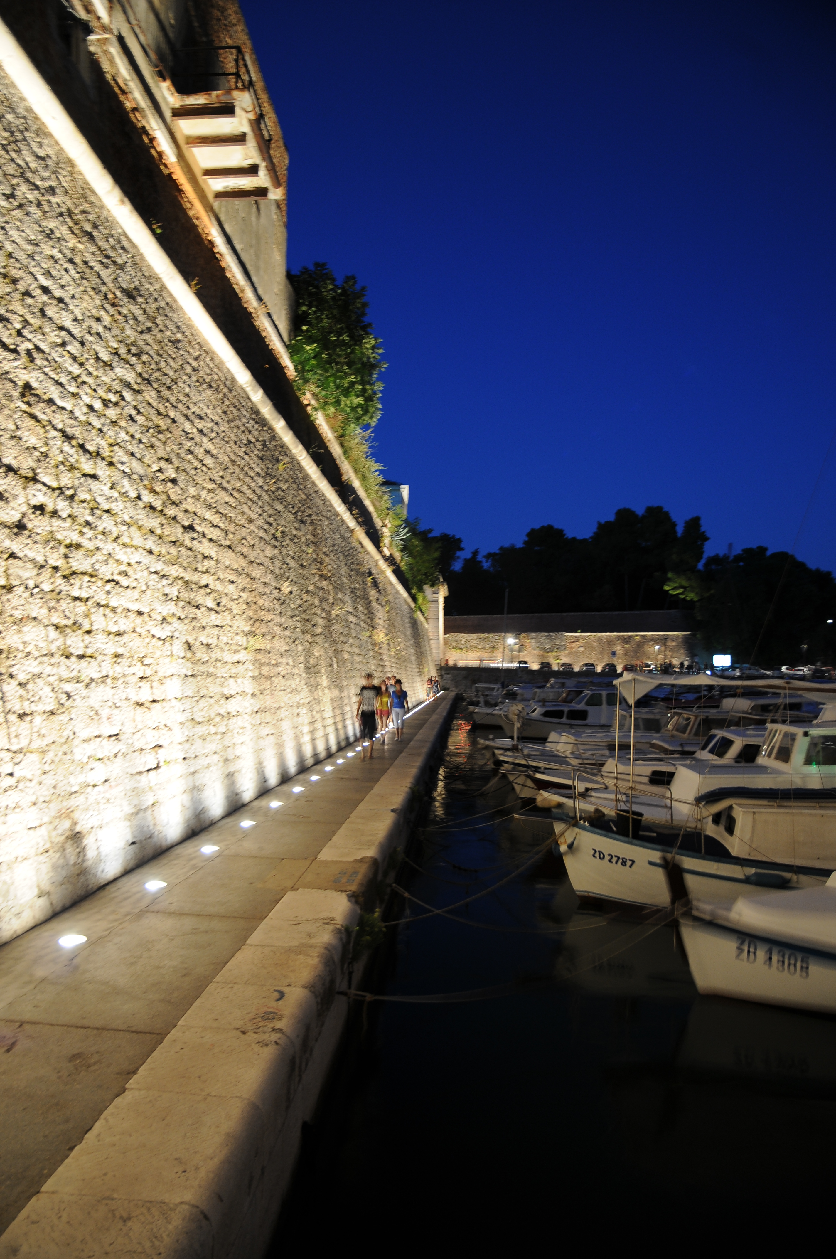 Kopnena Vrata, Zadar Das monumentale Stadttor (Porta terraferma) zum Festland, von Michele Sanmicheli aus dem Jahre 1543 im Hafen Foša. Es sind Überreste aus der römischen Zeit erhalten geblieben, wie auch aus dem Mittelalter, doch der größte Teil dieses Bauwerkes geht zurück in das 16 Jahrhundert. Neben den Stadtmauern befindet sich der mittelalterliche „Kapitänsturm“.